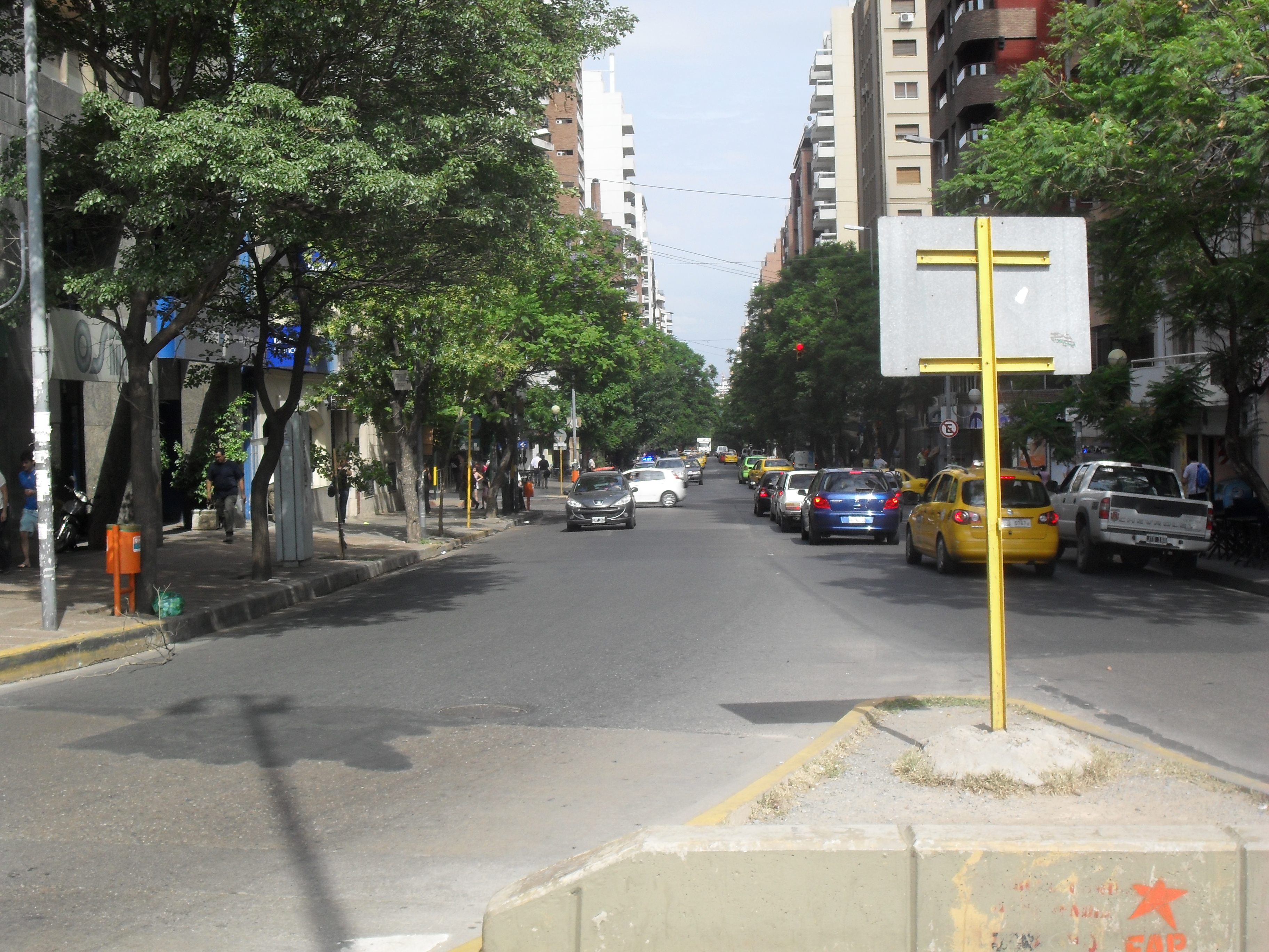 Vista de la arteria desde Plaza España